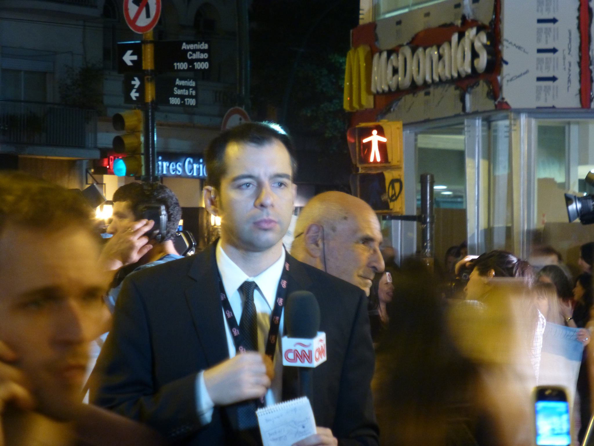 CNN en Español cubriendo el Cacerolazo de Septiembre